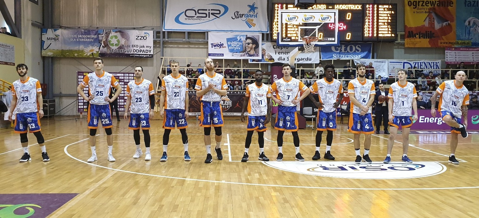 Stargard. Rosa Radom